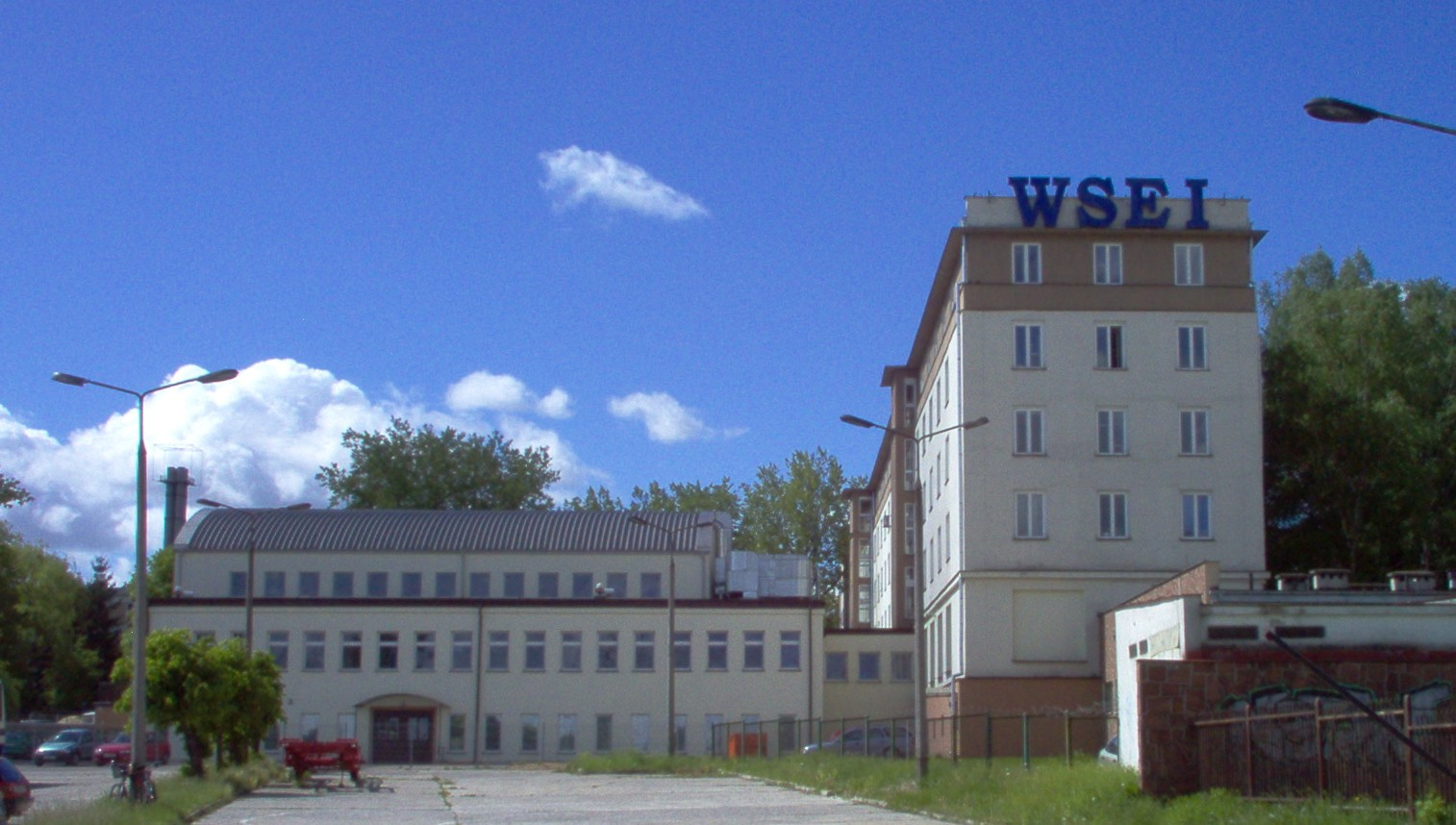 Budynek Wyższej Szkoły Ekonomii i Innowacji w Lublinie od strony ul. Mełgiewskiej